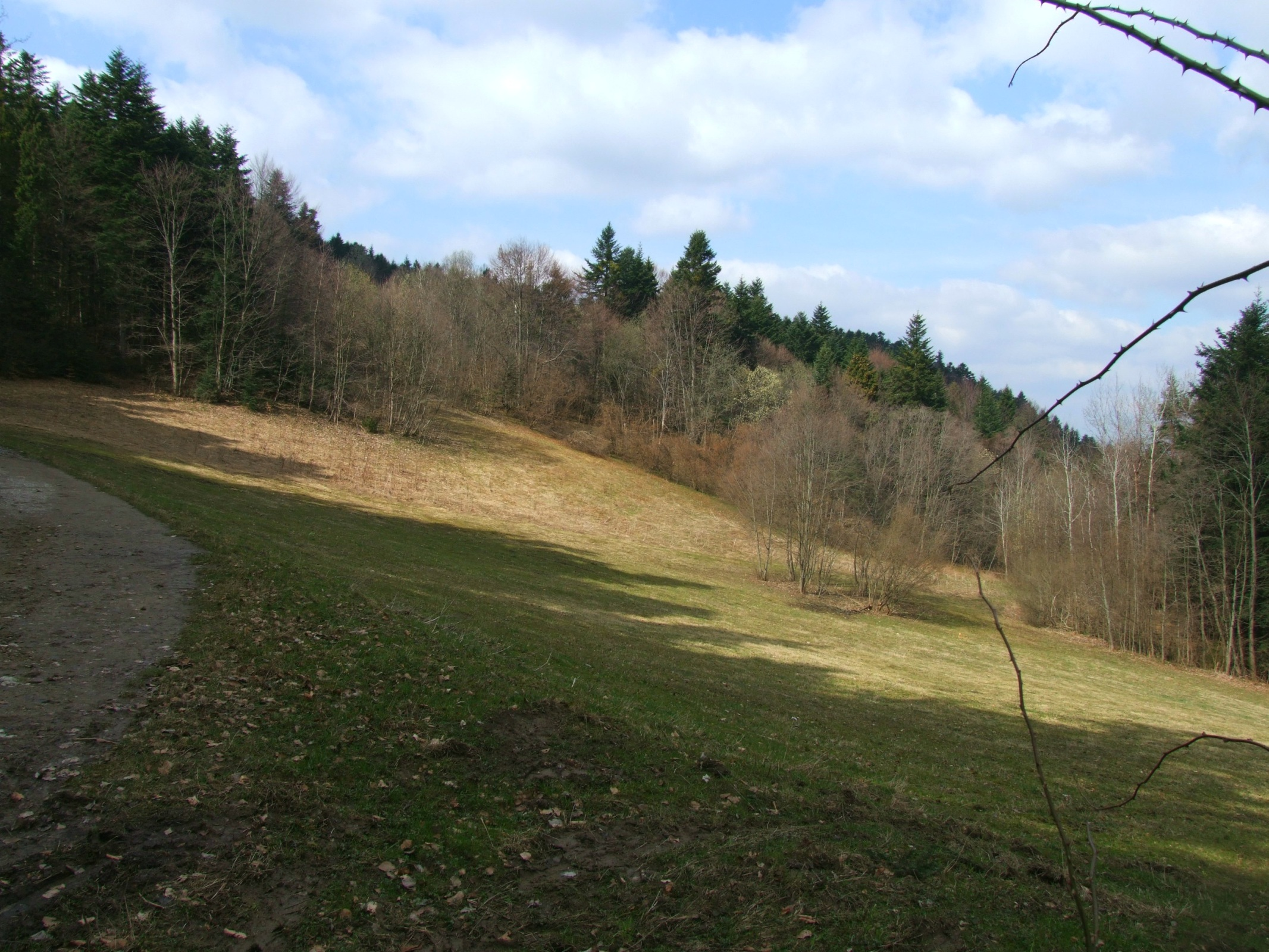 Polana Wymiarki w Pieninach (powyżej Bajkowego Gronia)